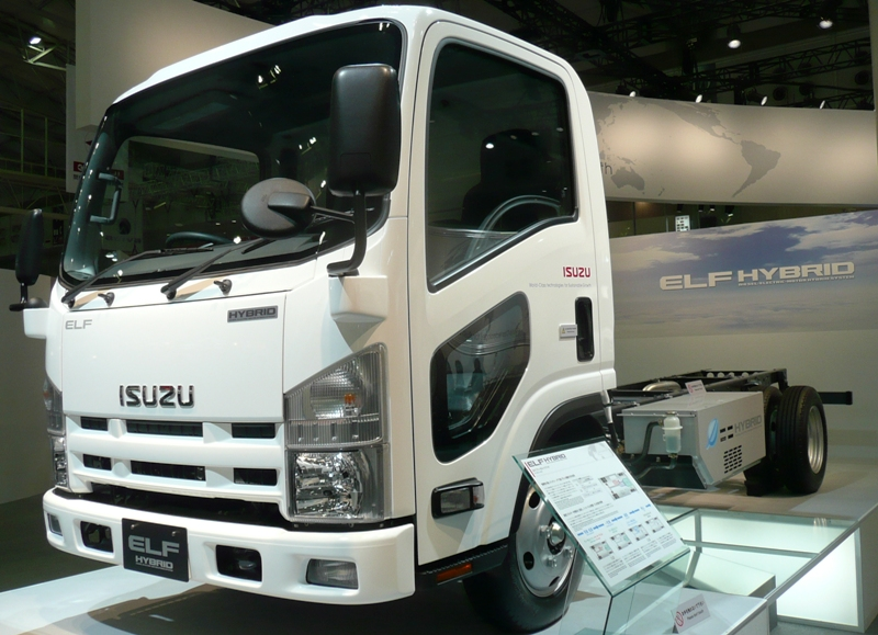 Isuzu Elf.